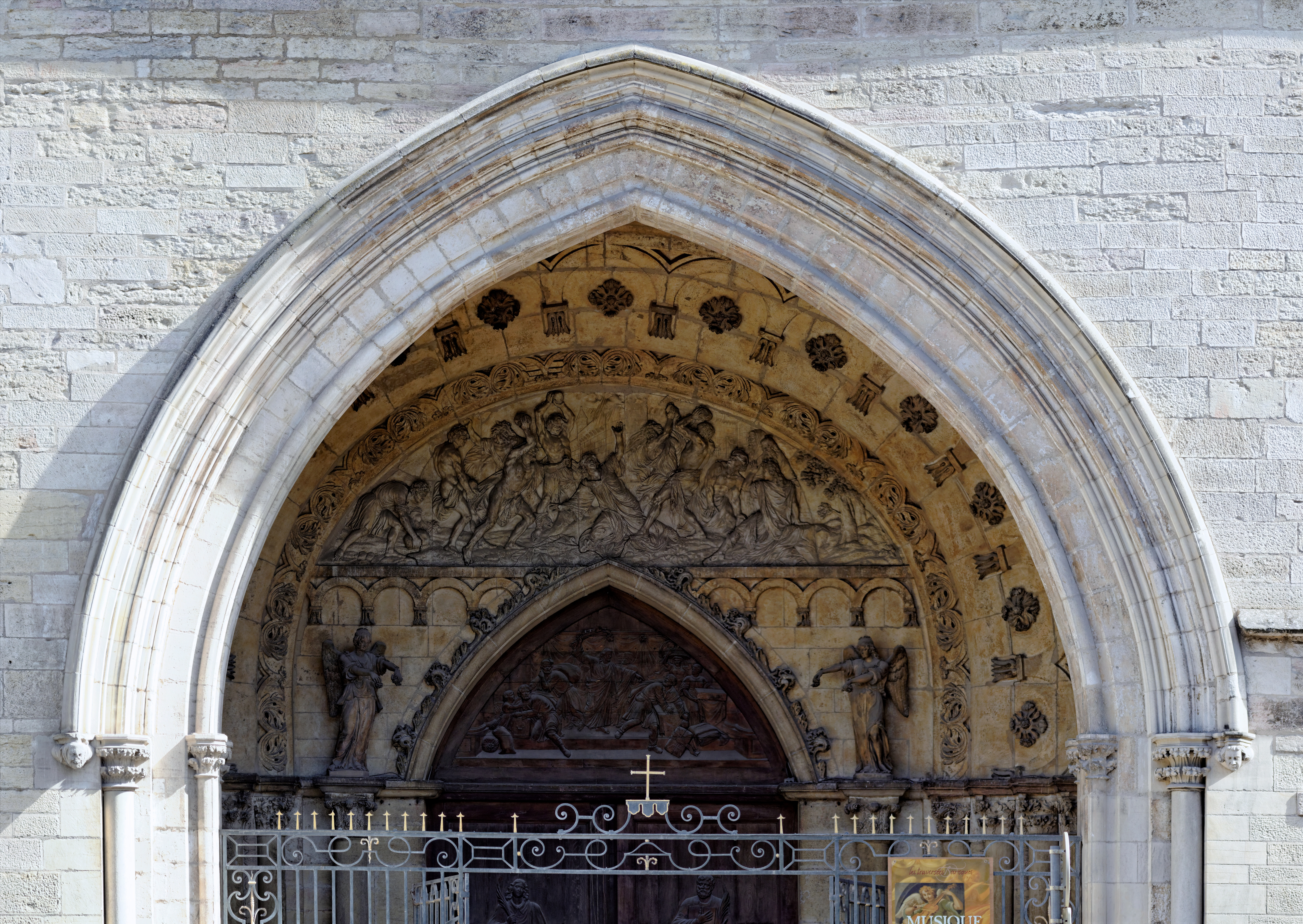 Tympan de la Cathédrale Saint-Bénigne de Dijon (Côte d'Or, Bourgogne, France). .